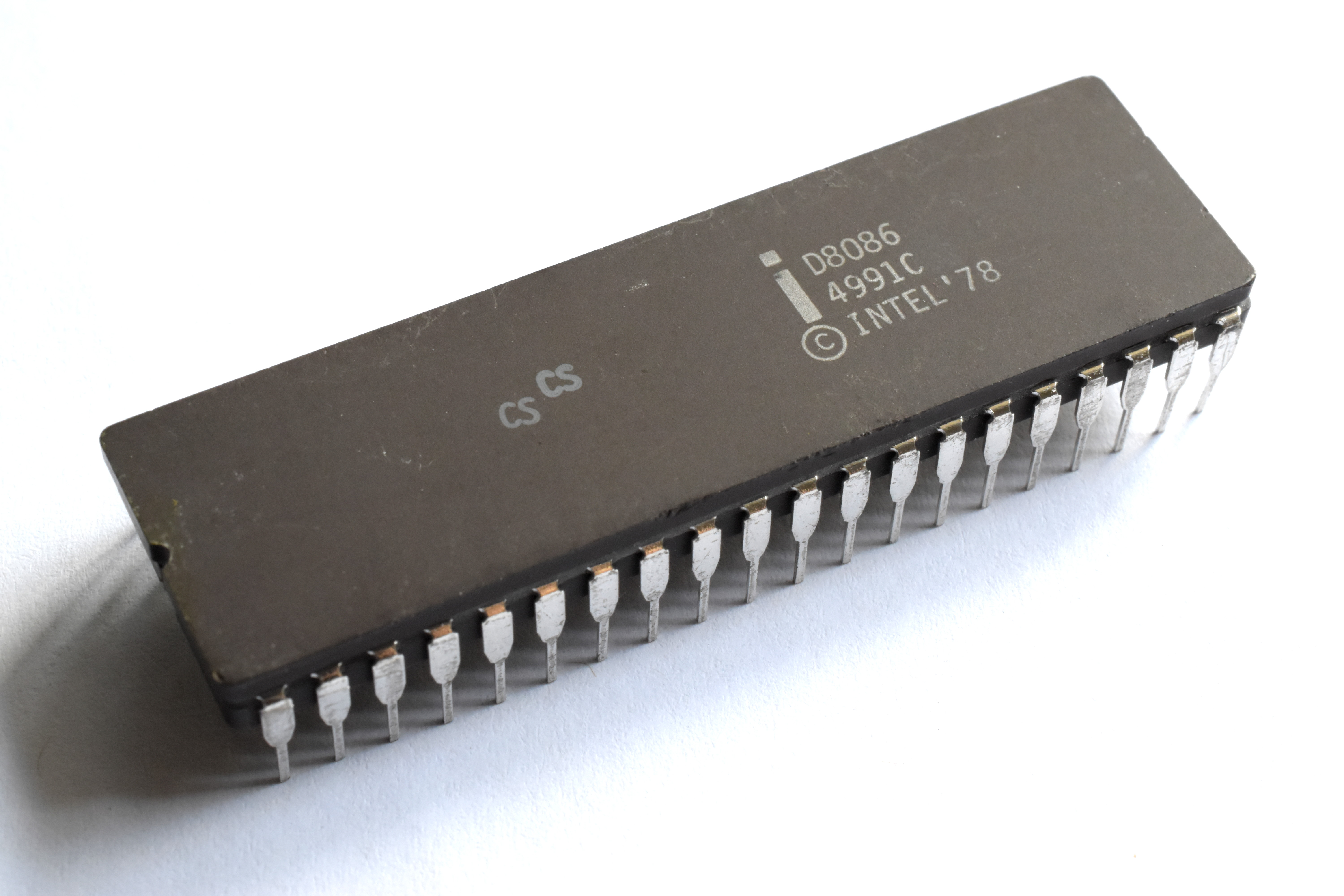 Procesoro Intel D8086 CS (Customer Sample).